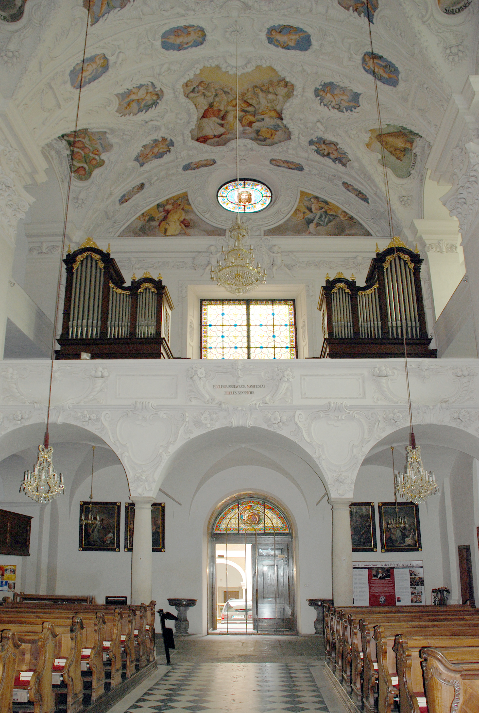 Stainz, Steiermark, Österreich: Pfarrkirche Stainz (ehemalige Klosterkirche der Augustiner-Chorherren), Orgelempore Object location46° 53′ 47.3″ N, 15° 15′ 48.83″ E